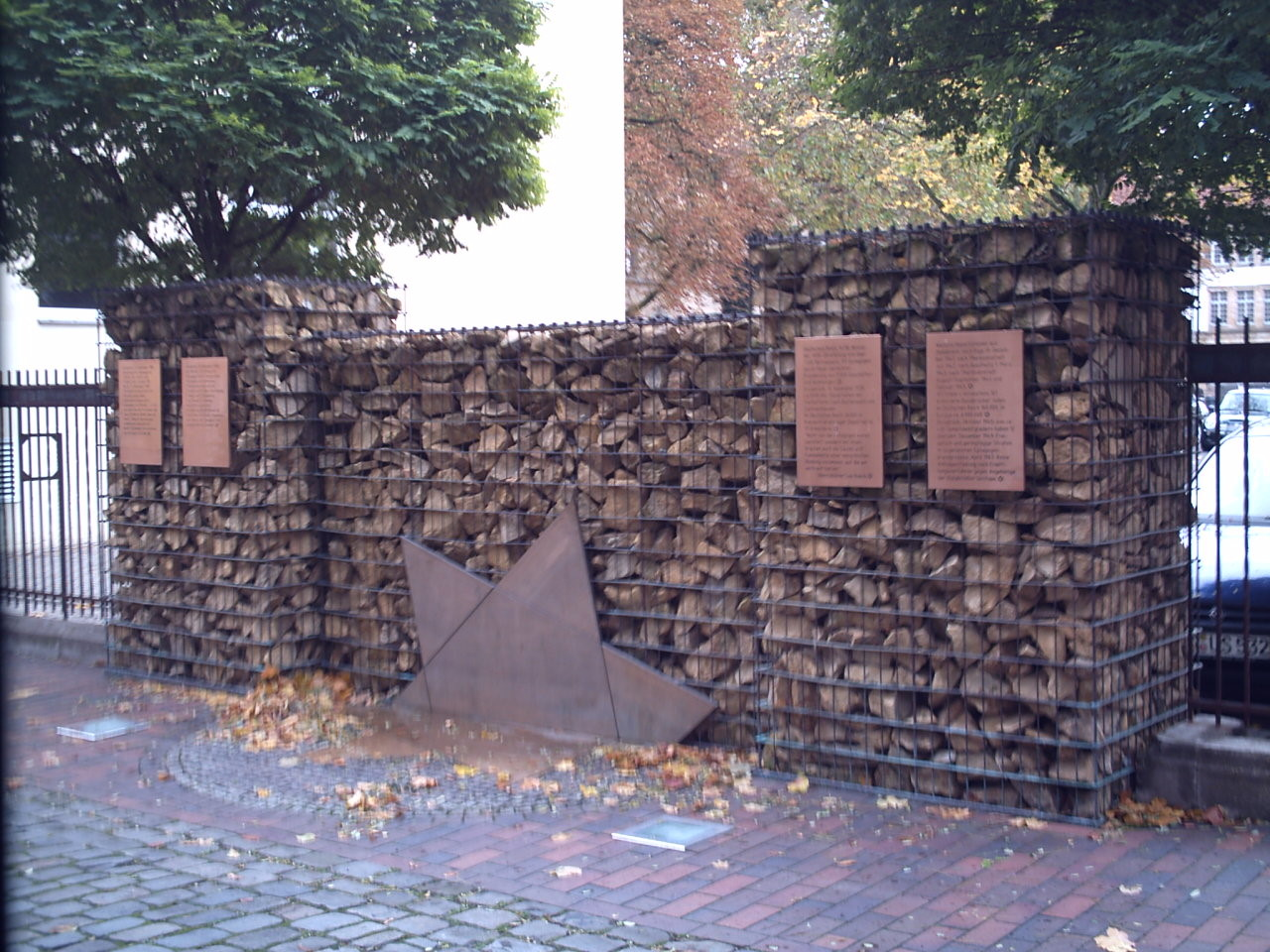 Mahnmal alte Synagoge Osnabrück 02